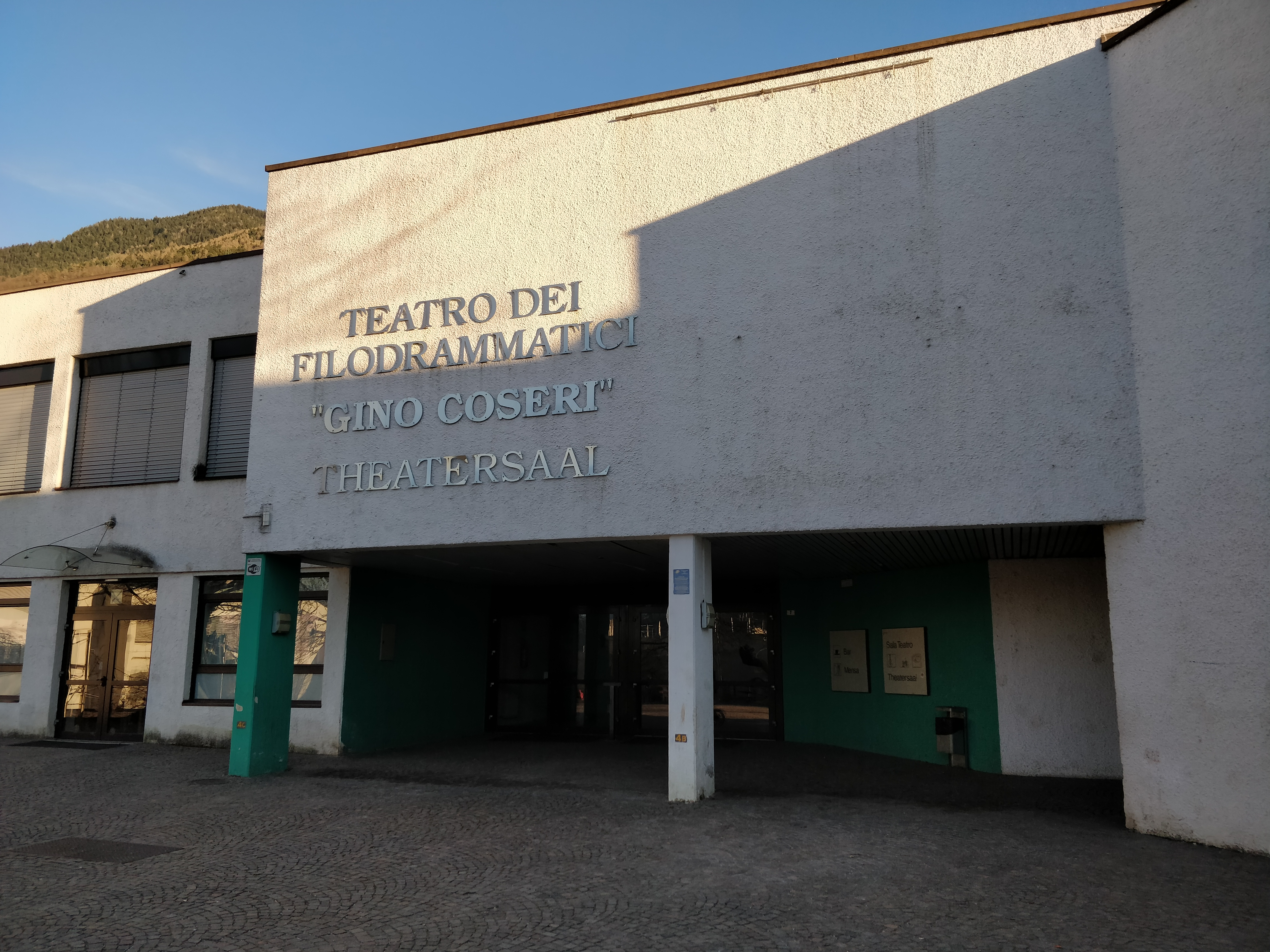 Teatro dei Filodrammatici "Gino Coseri", Passaggio scolastico Maria Damian, Laives, Italia